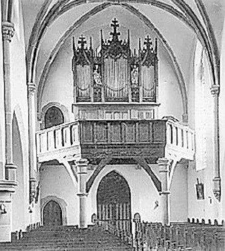 Ehemalige Hock-Orgel der Pfarrkirche St. Bartholomäus Hasborn-Dautweiler